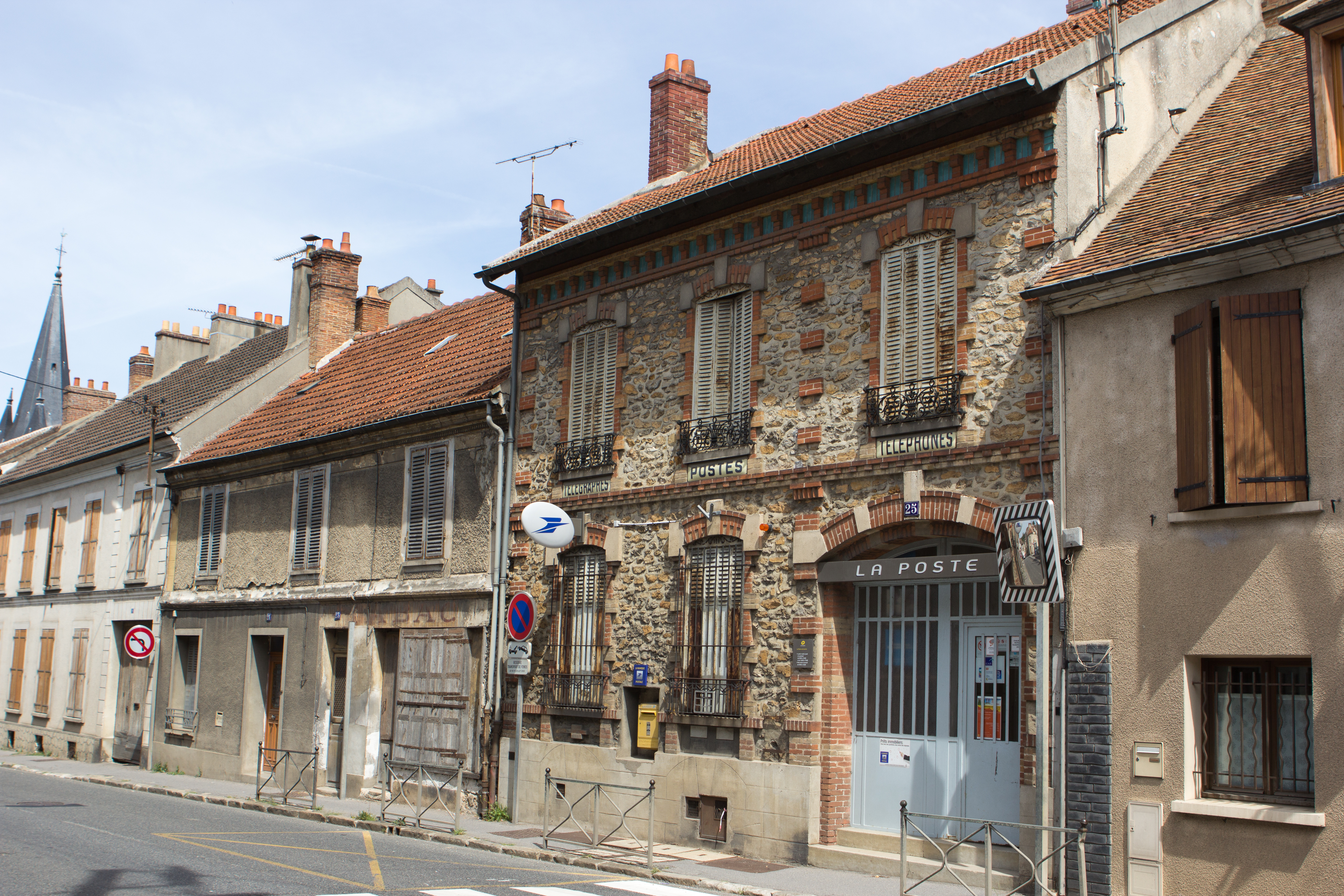 La Poste de Guignes / Guignes, Seine-et-Marne, France